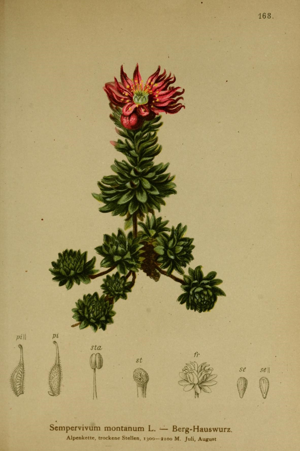 168. se se\ Scmpervivum montanum L. — Berg-Hauswurz. Alpenkette, trockene Stellen, 1300—2100 M. Juli, August